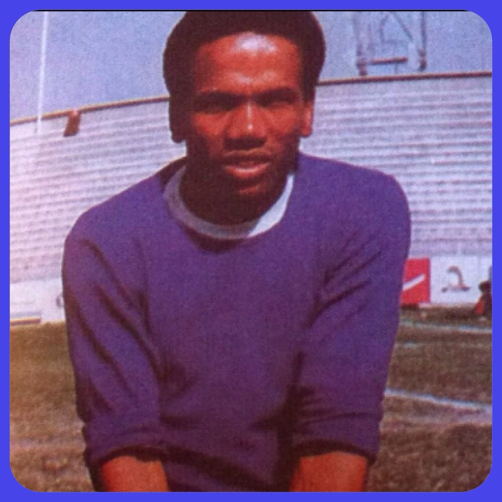 اللاعب السابق خلف سطام في احدى البطولات